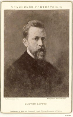 Pictorul german Ludwig von Löfftz 1845 - 1910